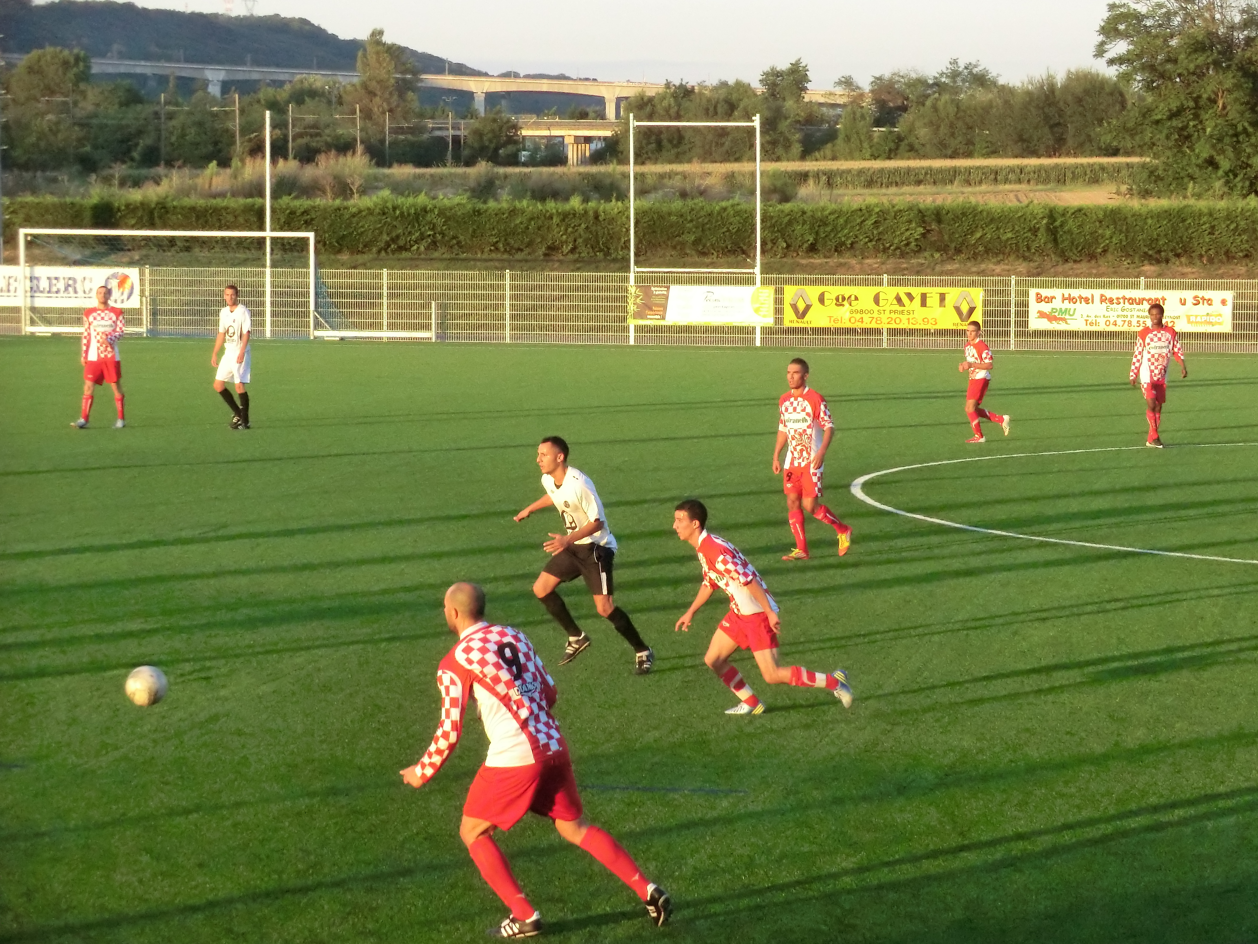 Match amical d'avant-saison entre Ain Sud Foot (honneur) et le FC Lyon (PHR) le 14 août 2013. Score final 7 à 1. Buteurs pour Ain Sud Foot : Joubert (x3), Thomas (x2), Chanel, Courtial. Ain Sud Foot joue en noir en blanc ; FC Lyon en rouge et blanc.